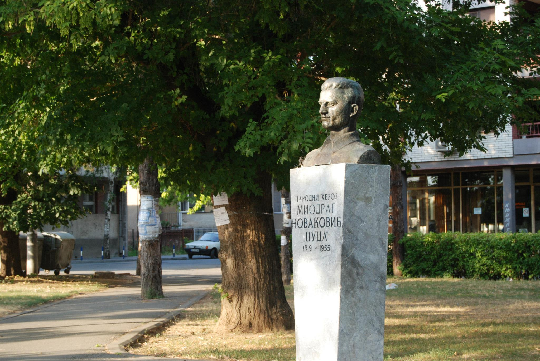 Споменик борцу Миодрагу Новаковићу Џуџи